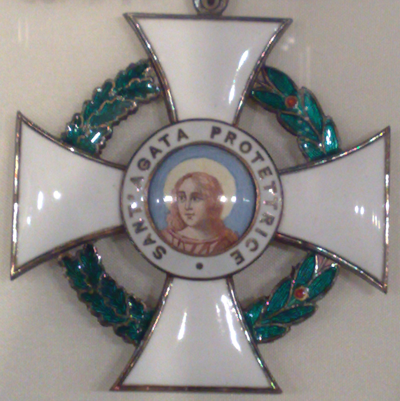 Agatha-Orden_Grosskreuz